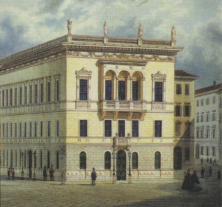 "Revoltella-Palais", Painting of Palazzo Revoltella in Triest, by Alberto Rieger (1865)